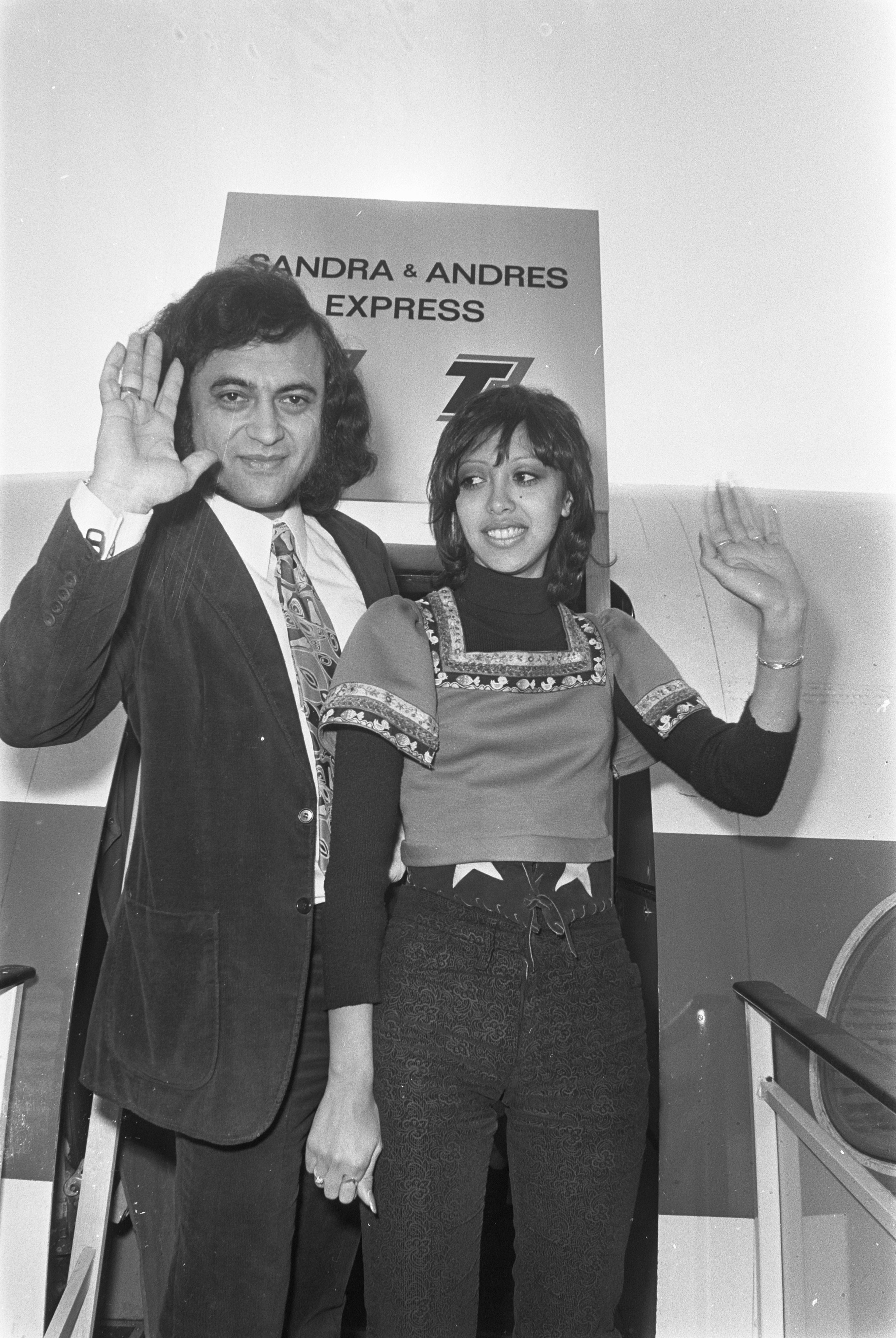 Collectie / Archief : Fotocollectie Anefo Reportage / Serie : [ onbekend ] Beschrijving : Sandra en Andres vertrekken van Schiphol naar Eurovisie Songfestival in Edinburgh Datum : 22 maart 1972 Locatie : Noord-Holland, Schiphol Trefwoorden : songfestivals Persoonsnaam : Andres Instellingsnaam : Eurovisie Song Festival Fotograaf : Verhoeff, Bert / Anefo Auteursrechthebbende : Nationaal Archief Materiaalsoort : Negatief (zwart/wit) Nummer archiefinventaris : bekijk toegang 2.24.01.05 Bestanddeelnummer : 925-4773